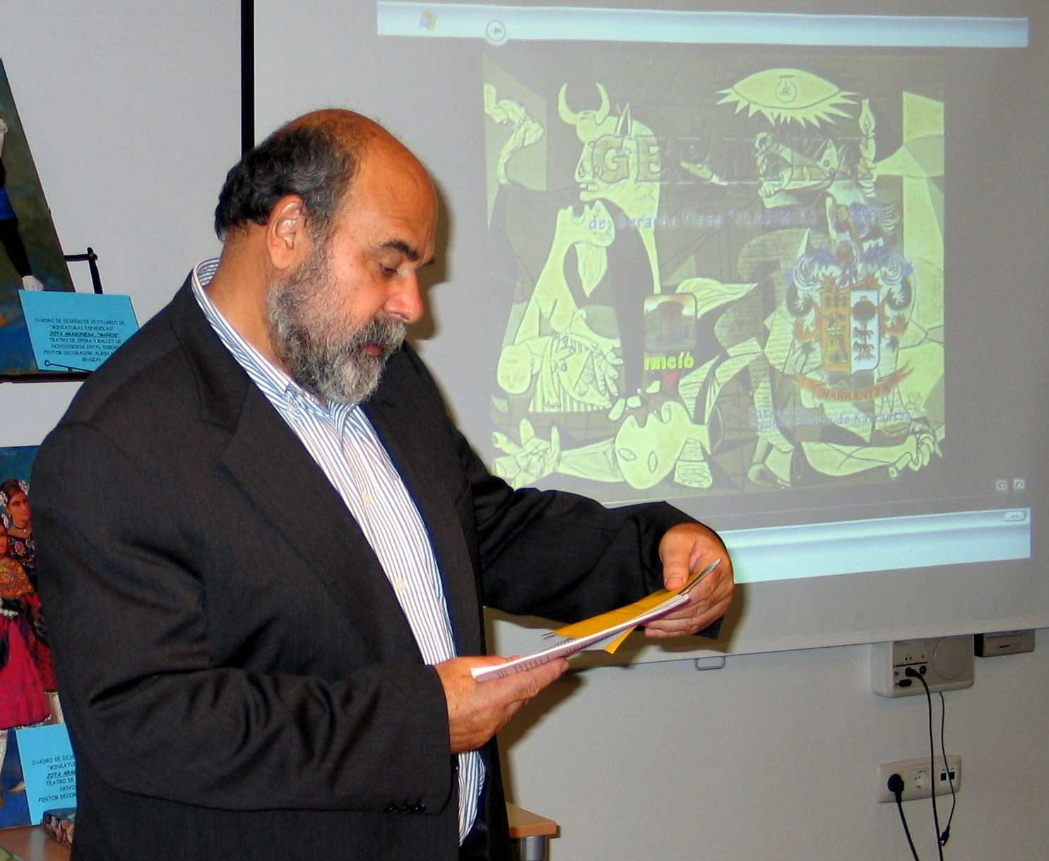 El profesor José Ángel Ascunce impartiendo una conferencia.